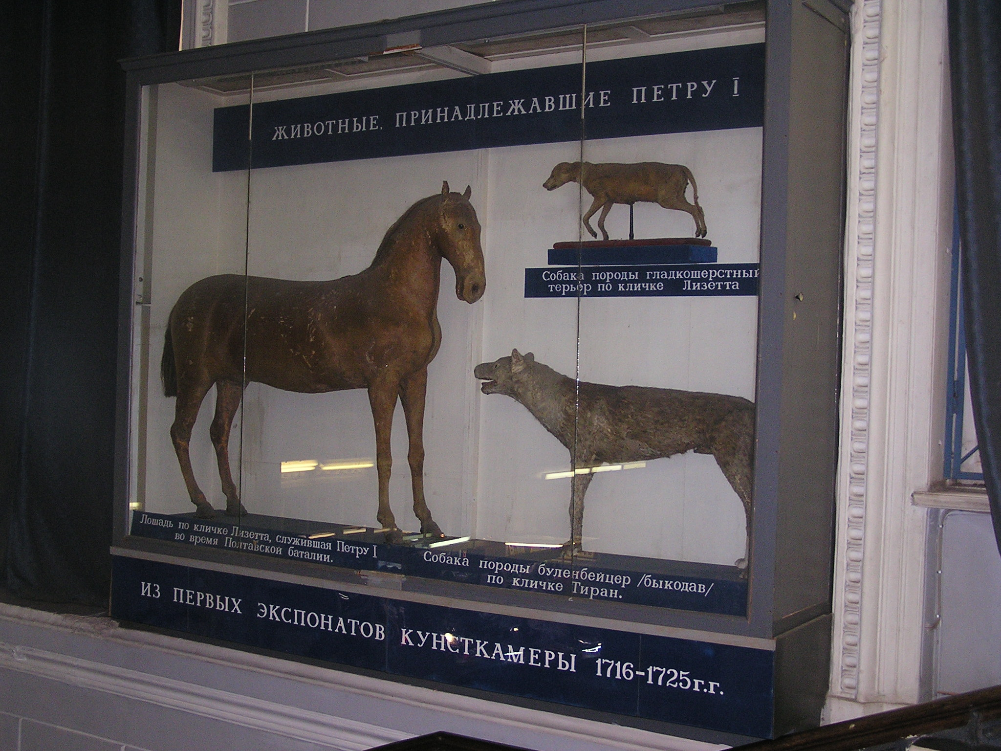 Зоологический музей в Санкт-Петербурге. Животные, принадлежавшие Петру I